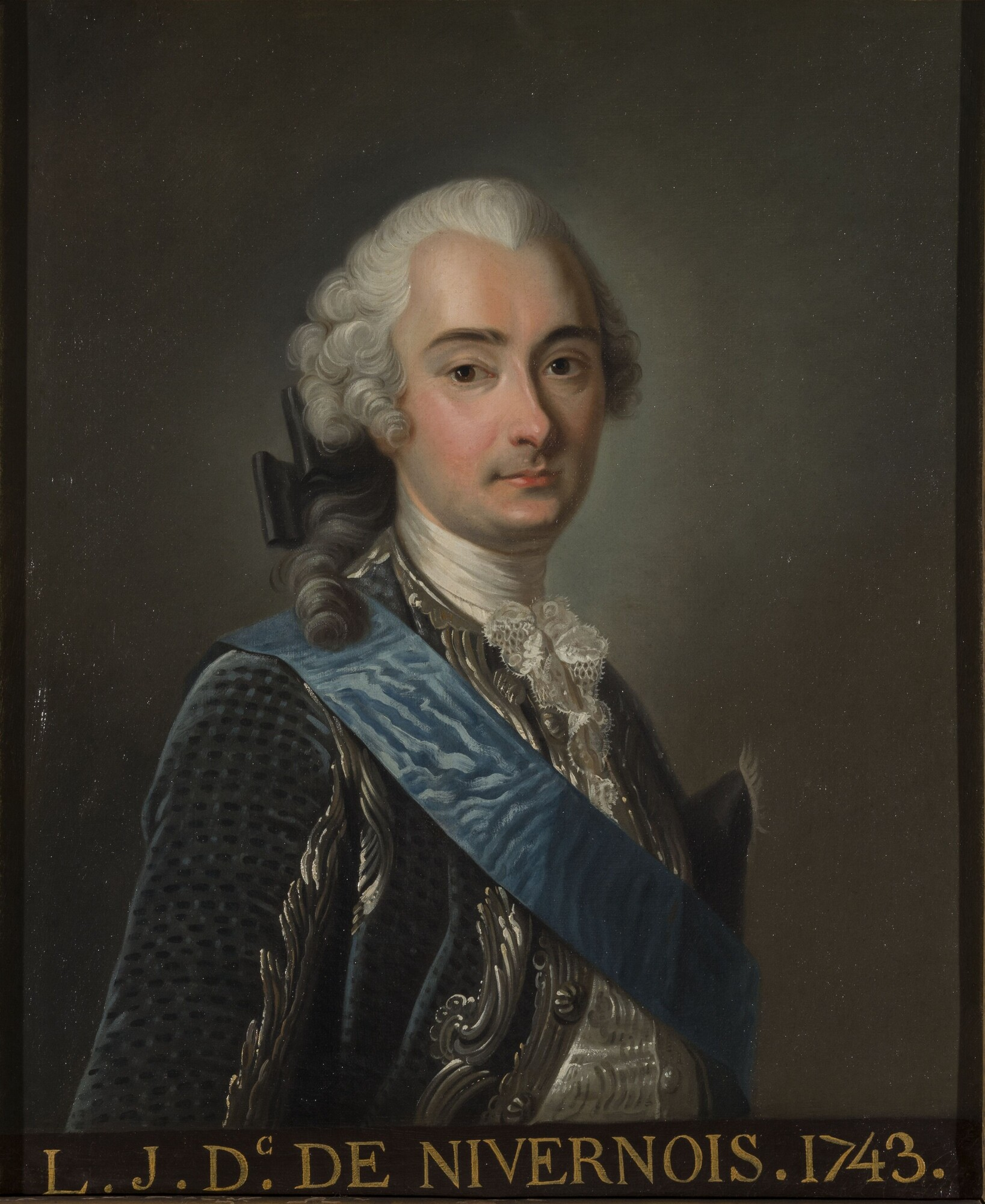 Louis-Jules-Barbon Mancini-Mazarin, duc de Nivernais (1716-1798)